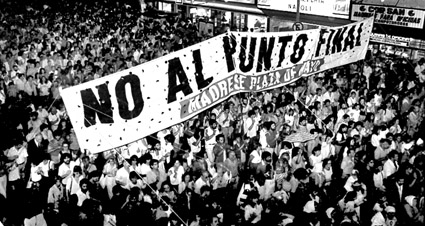 Marcha contra la Ley del "Punto Final" desde el Obelisco hasta la Plaza de los dos Congresos.